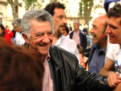 Senador Reinaldo Gargano. Partido Socialista. Uruguay Author: Fernando da Rosa